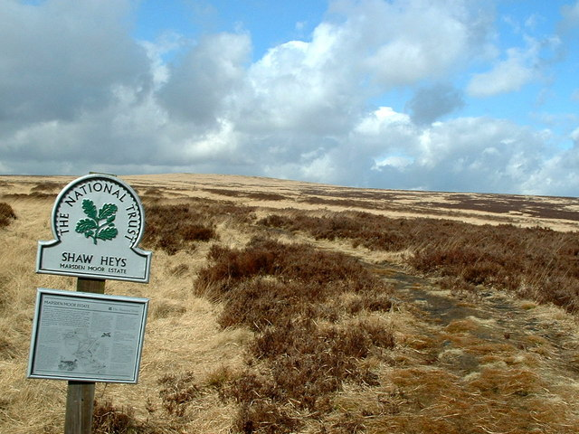 Shaw Heys, Marsden Moor Estate